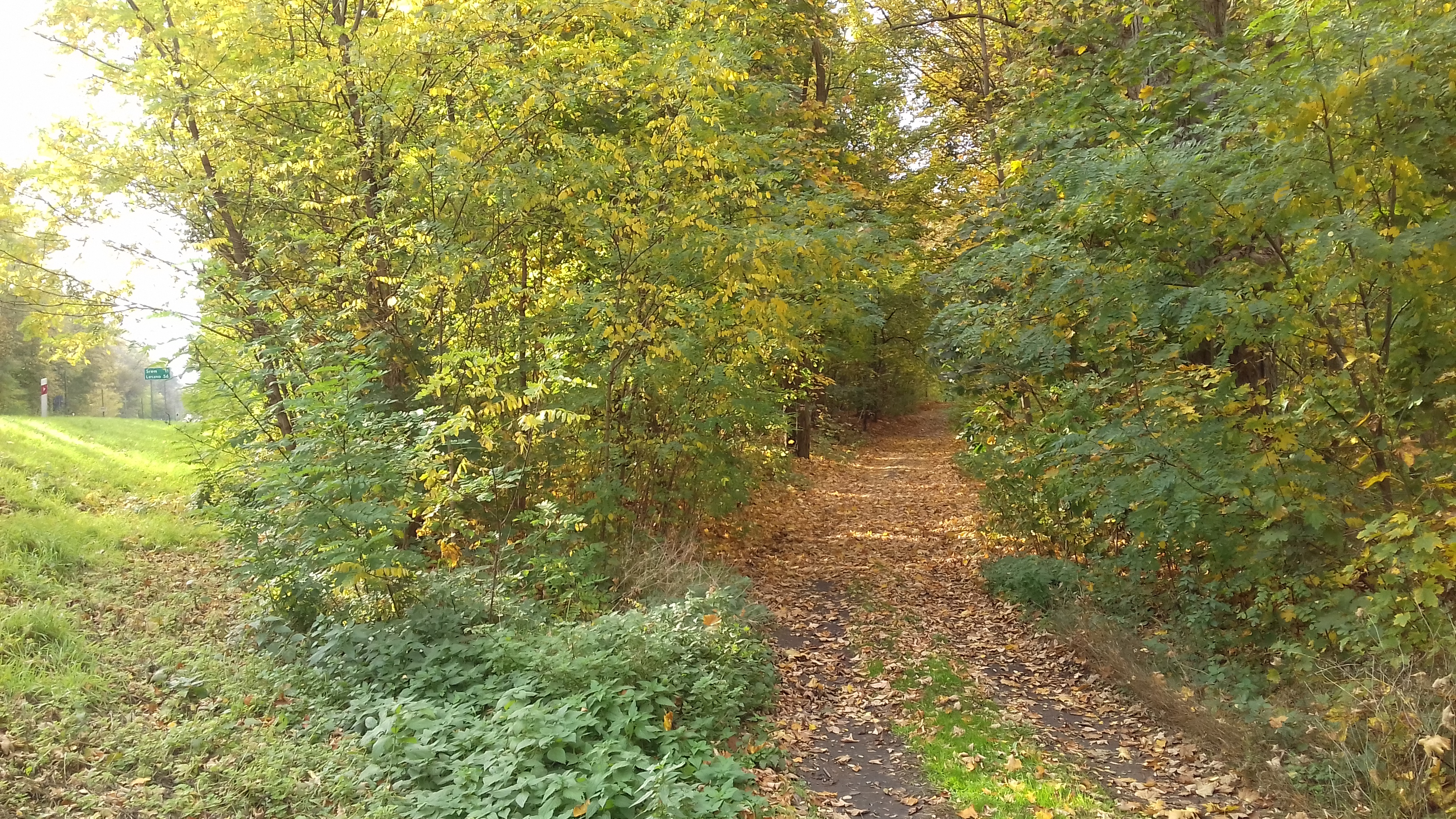 Wyjazd z lasu na DW nr 432 przed mostem na Głuszynce, wspólny przebieg szlaków pieszych nr 186 (czerwonego) i nr 3581 (żółtego)